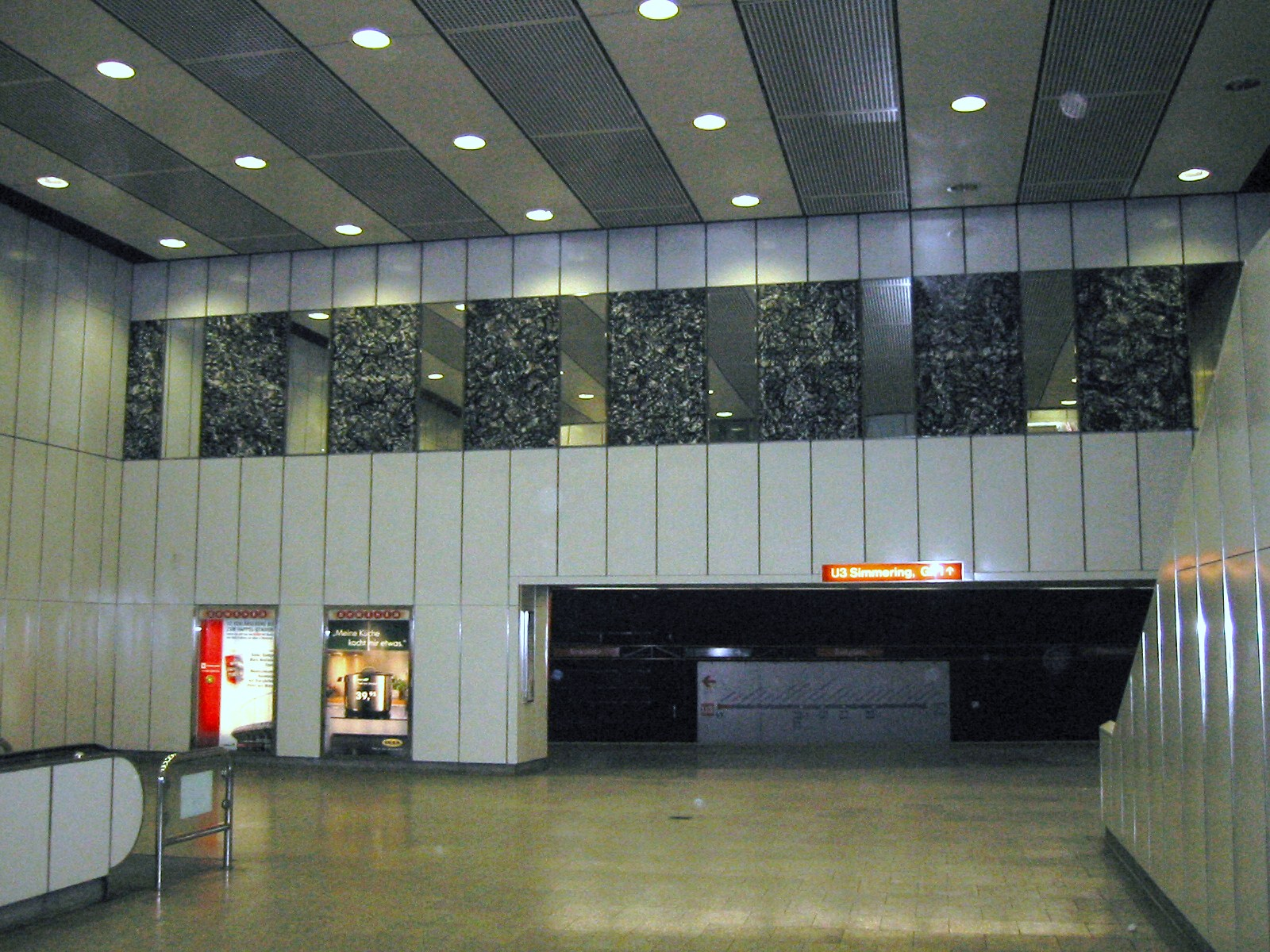 Wien U3 Enkplatz